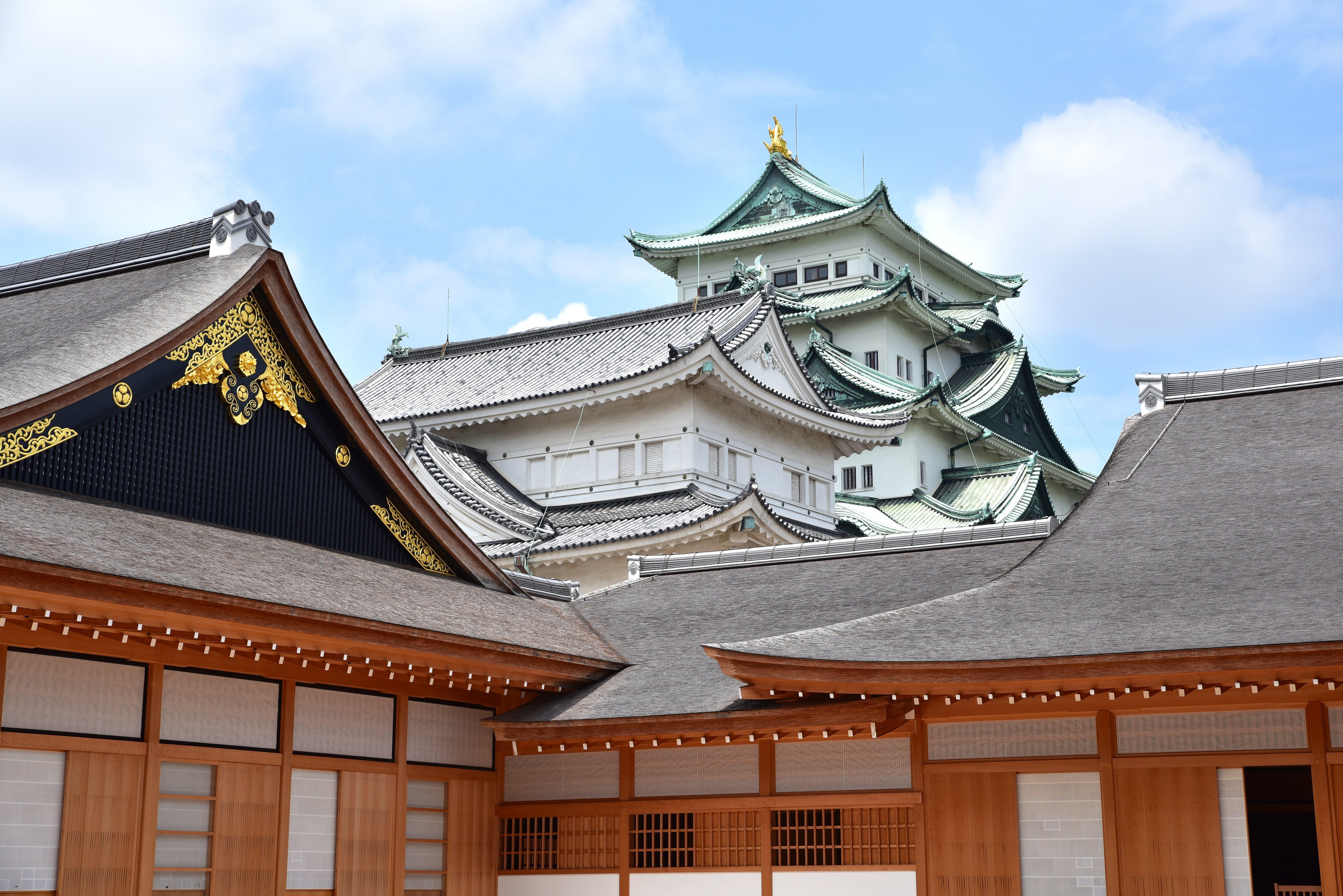 名古屋城の天守と本丸御殿